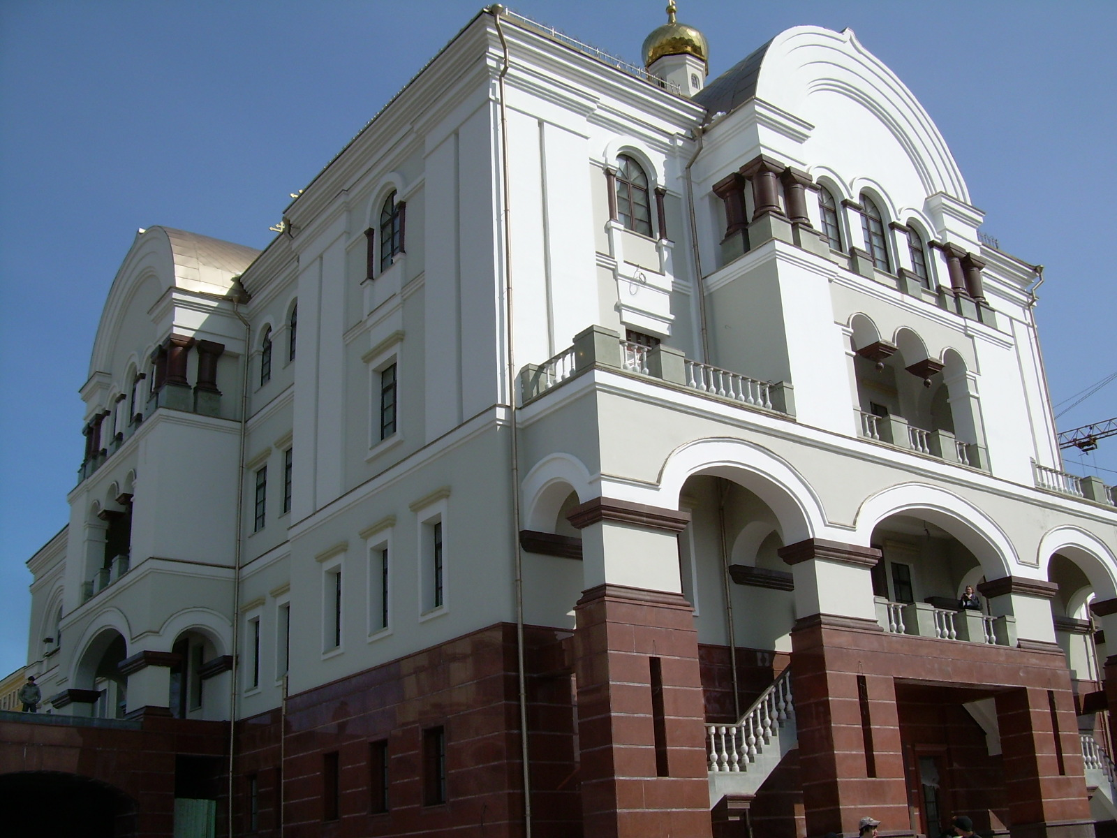 Храм на Крови во имя Всех Святых в Земле Российской просиявших